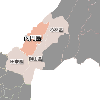 內門區相對位置